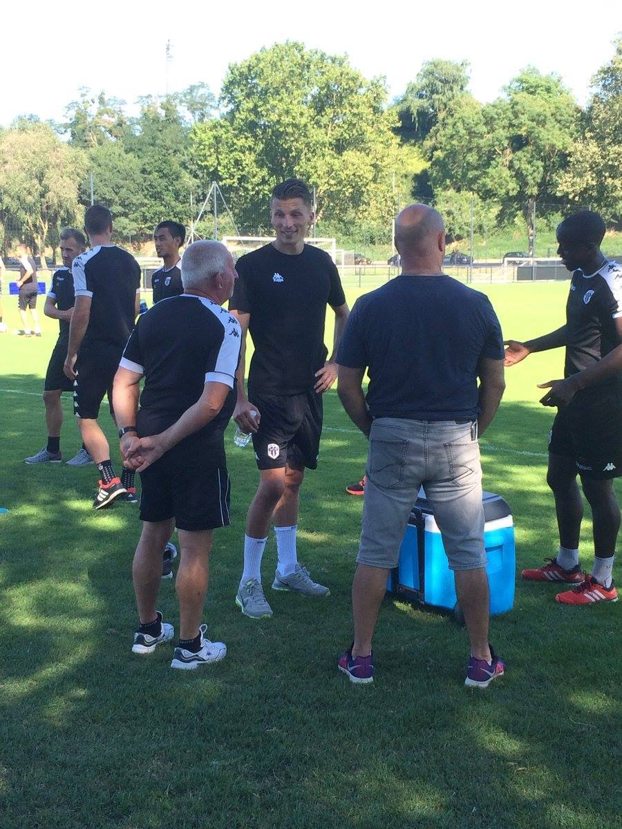 Angers SCO